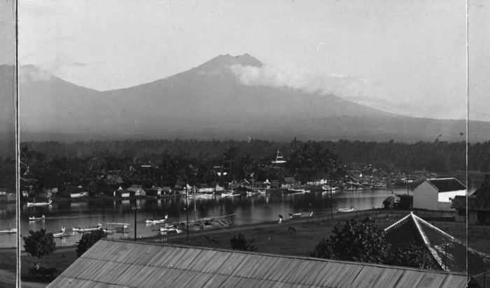 Foto. Vormt samen met inventarisnummers 0002 0437 en 0002 3439 een panoramafoto. Gezicht op Banjoewangi, Oost-Java